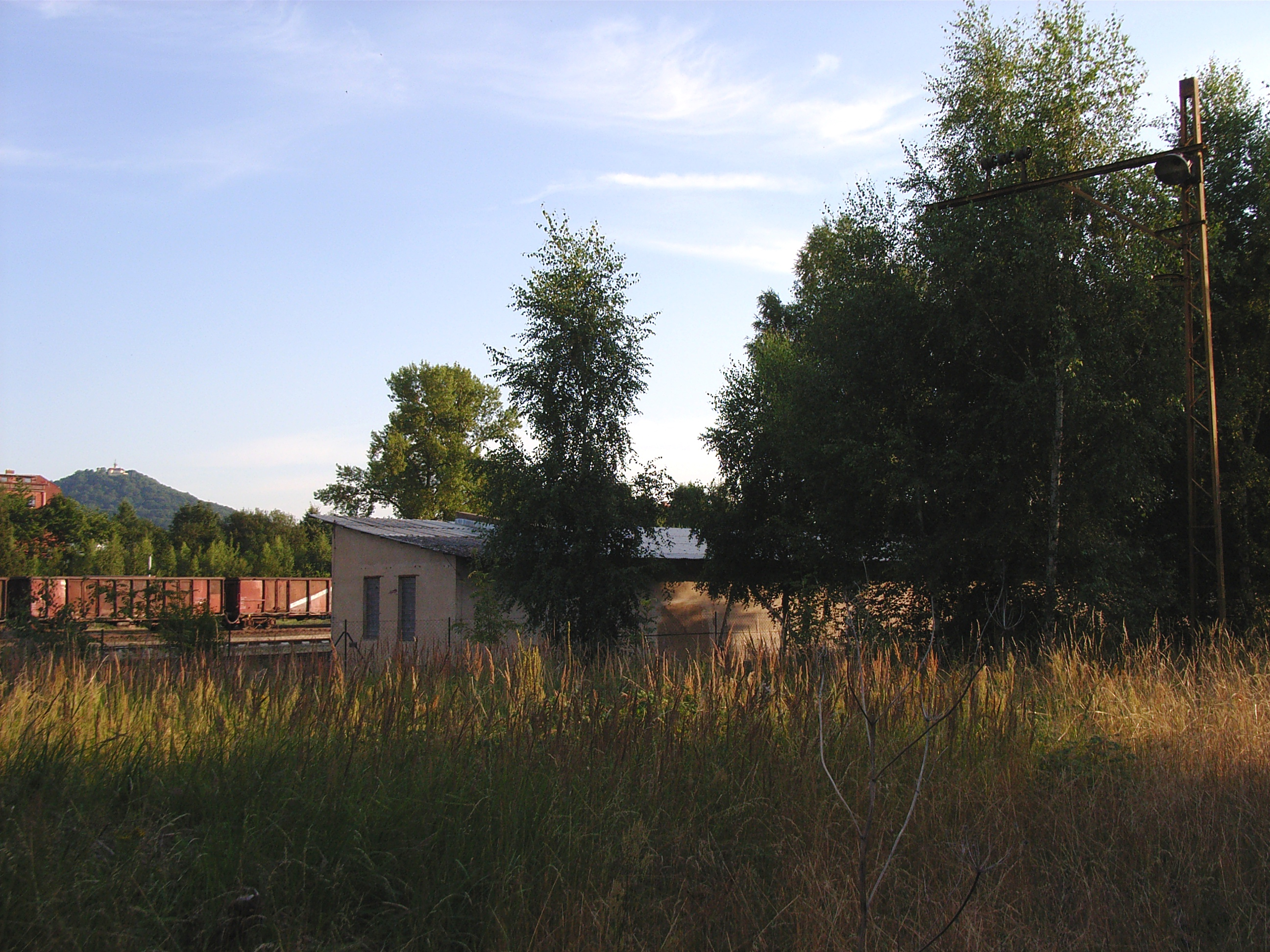 Ehemaliger Oberleitungsmast am einstigen Bahnbetriebswerk Schlauroth (RAW Görlitz)